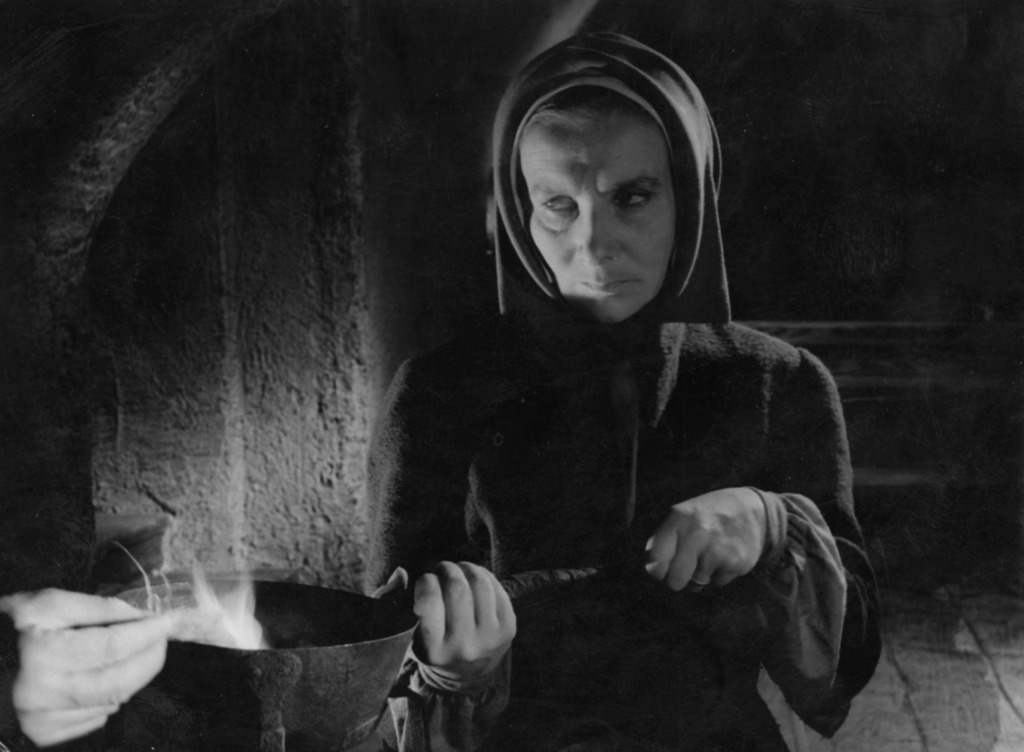 Sava Sever kot Karničnica v filmu Samorastniki.